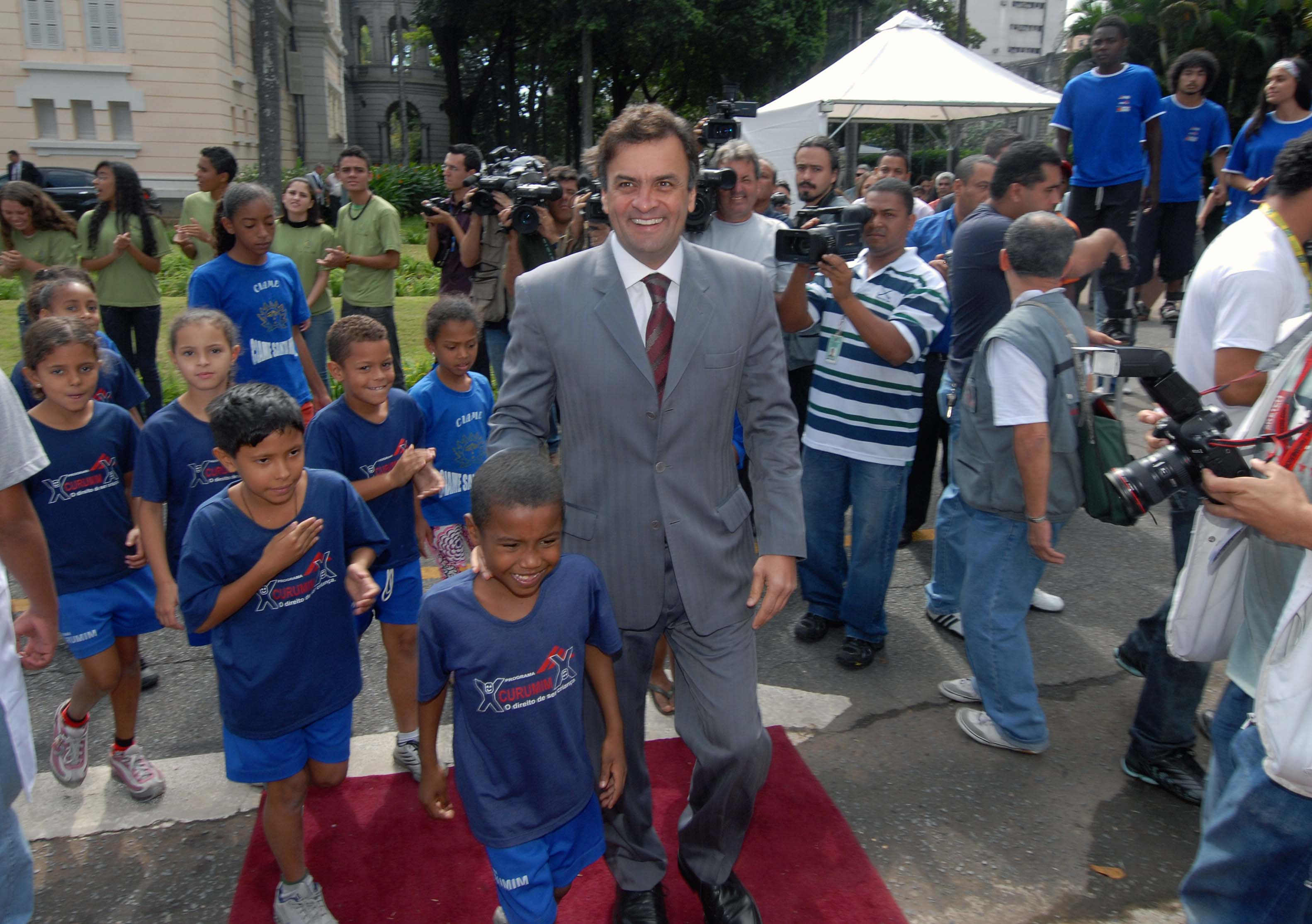 O governador Aécio Neves apresentou, nesta quinta-feira (14/05), balanço do primeiro ano da Campanha Proteja Nossas Crianças, criada ano passado para incentivar a sociedade a denunciar atos de violência doméstica e exploração sexual de crianças e adolescentes. De maio de 2008 a abril deste ano, o Disque Direitos Humanos (0800311119) recebeu 2.879 denúncias, o que representa aumento de 49,5% em relação ao mesmo período do ano anterior quando não havia campanha. Durante a solenidade, realizada no Palácio da Liberdade, o governador entregou 30 carros e 250 computadores para reforçar o atendimento dos conselhos tutelares de 250 municípios mineiros, órgãos responsáveis por receber as denúncias e fiscalizar o cumprimento dos direitos das crianças e adolescentes. Ao final do evento, o governador adesivou alguns carros na avenida Cristovão Colombo com o Disque Direitos Humanos, da Campanha Proteja. Foto: Omar Freire/Imprensa MG